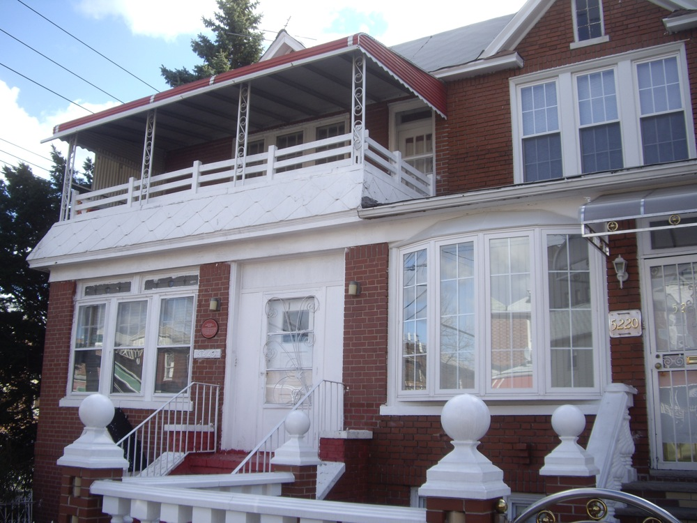 Jackie Robinson House, Brooklyn, NY